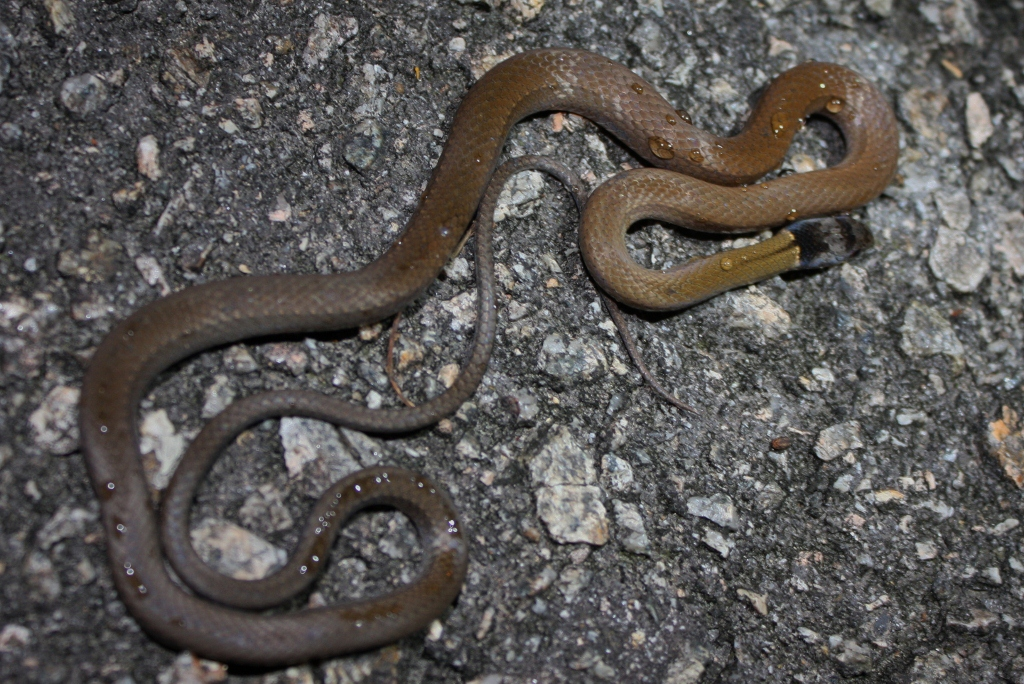 Taken in Sai Kung West Country Park.